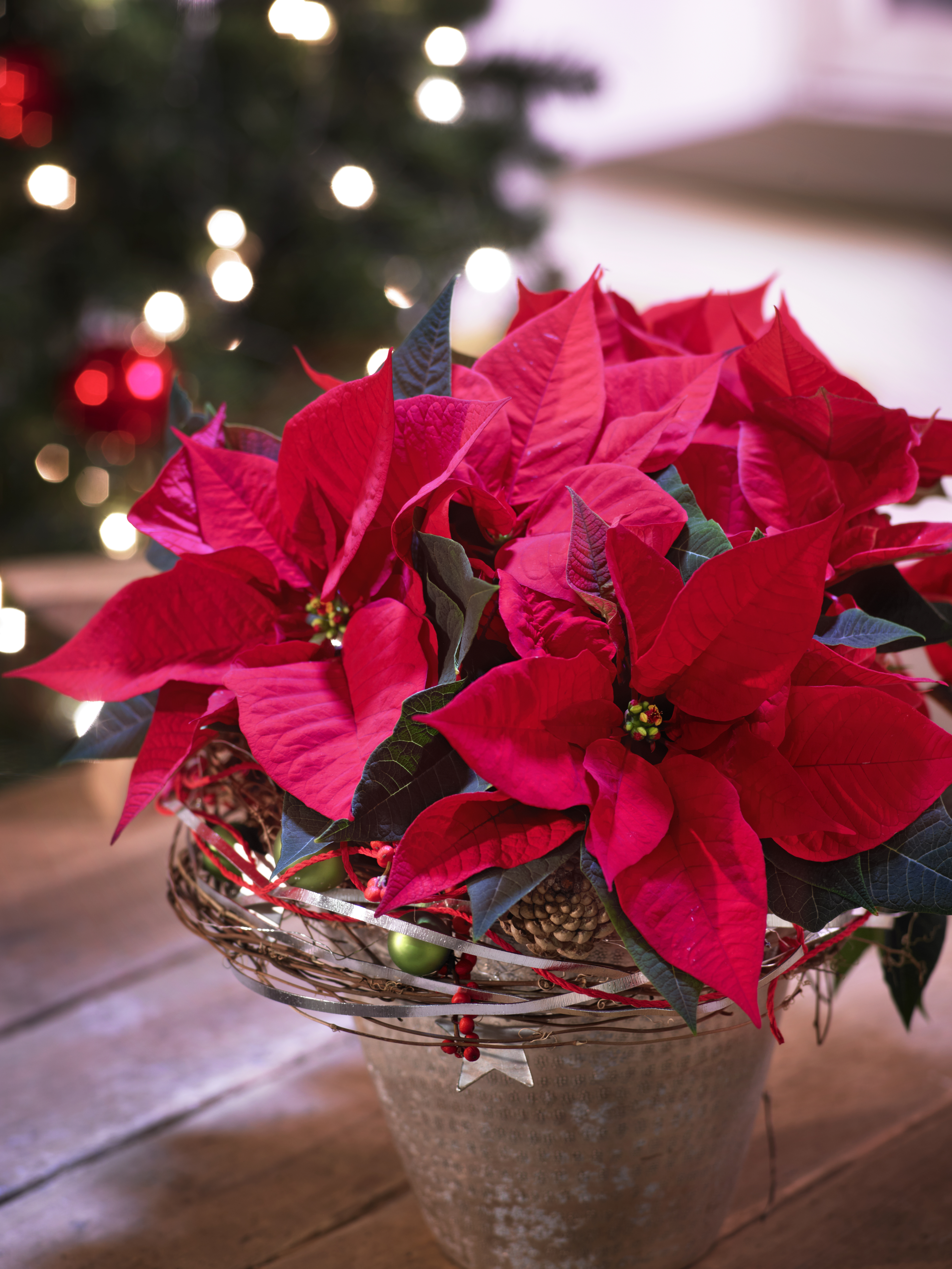 Arpetan: Avec de l'imagination et quelques accessoires, il est facile de faire une jolie déco autour d'un poinsettia